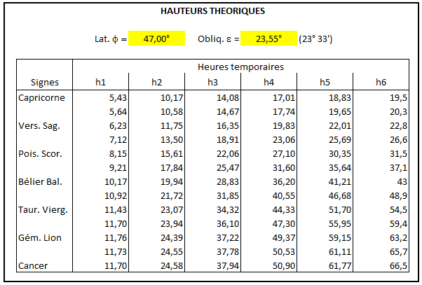 Hauteurs théoriques du Soleil pour 1150, suivant signes zodiacaux.